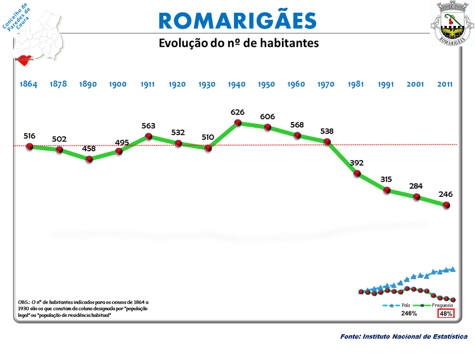 Censos 1864/2011